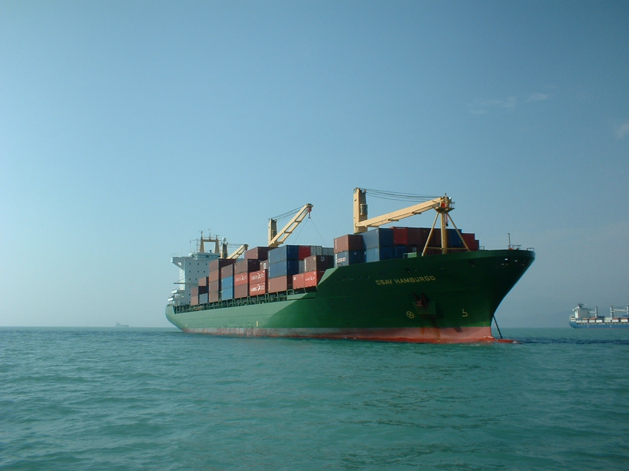 Containerschiff CSAV Hamburgo Typ MTW 2500 der MTW-Werft